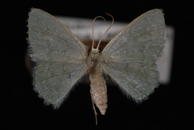 Chloropteryx paularia